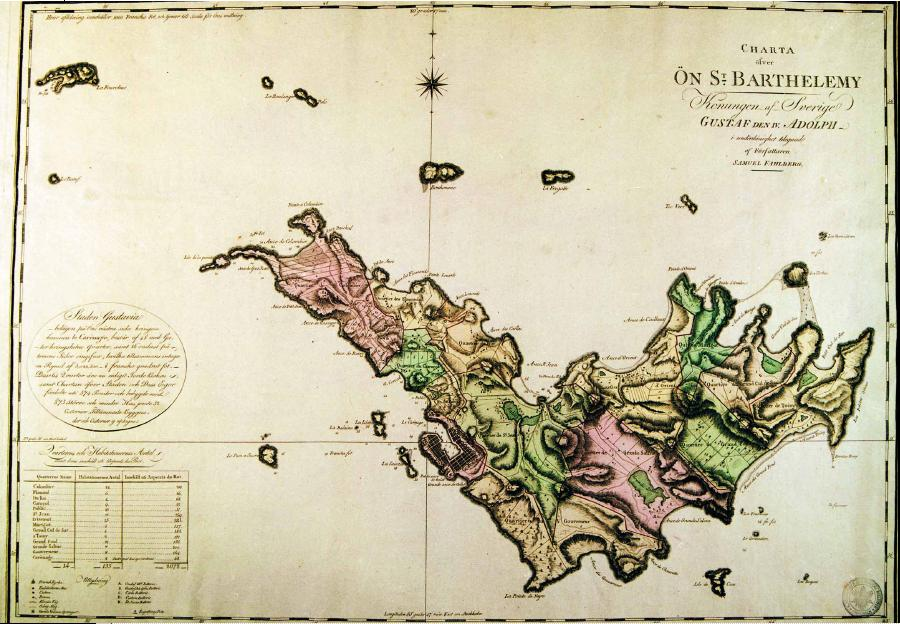 Saint-Barthélemy i slutet av 1700-talet